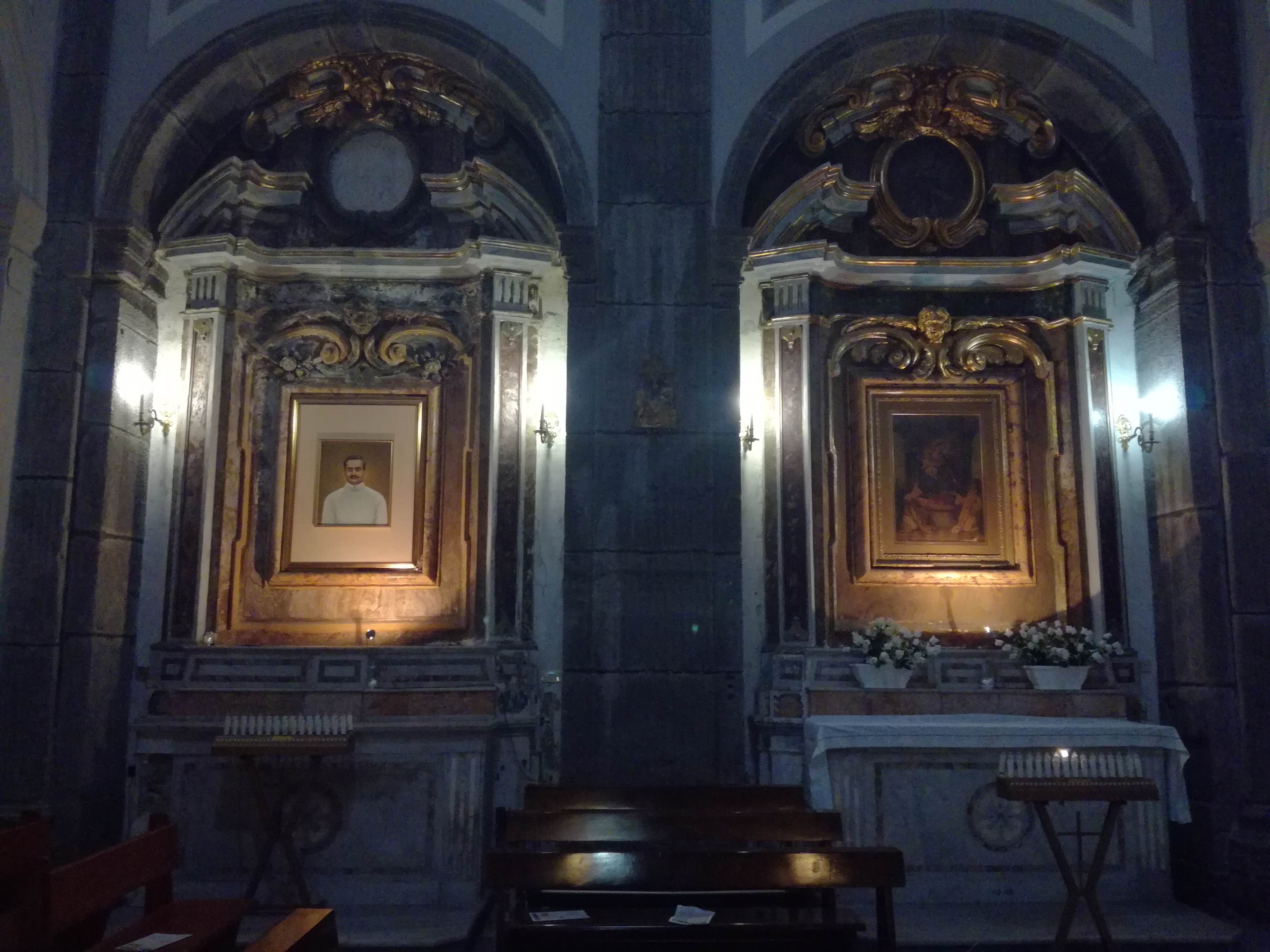 Transetto sinistro di Sant'Onofrio dei Vecchi (Napoli)